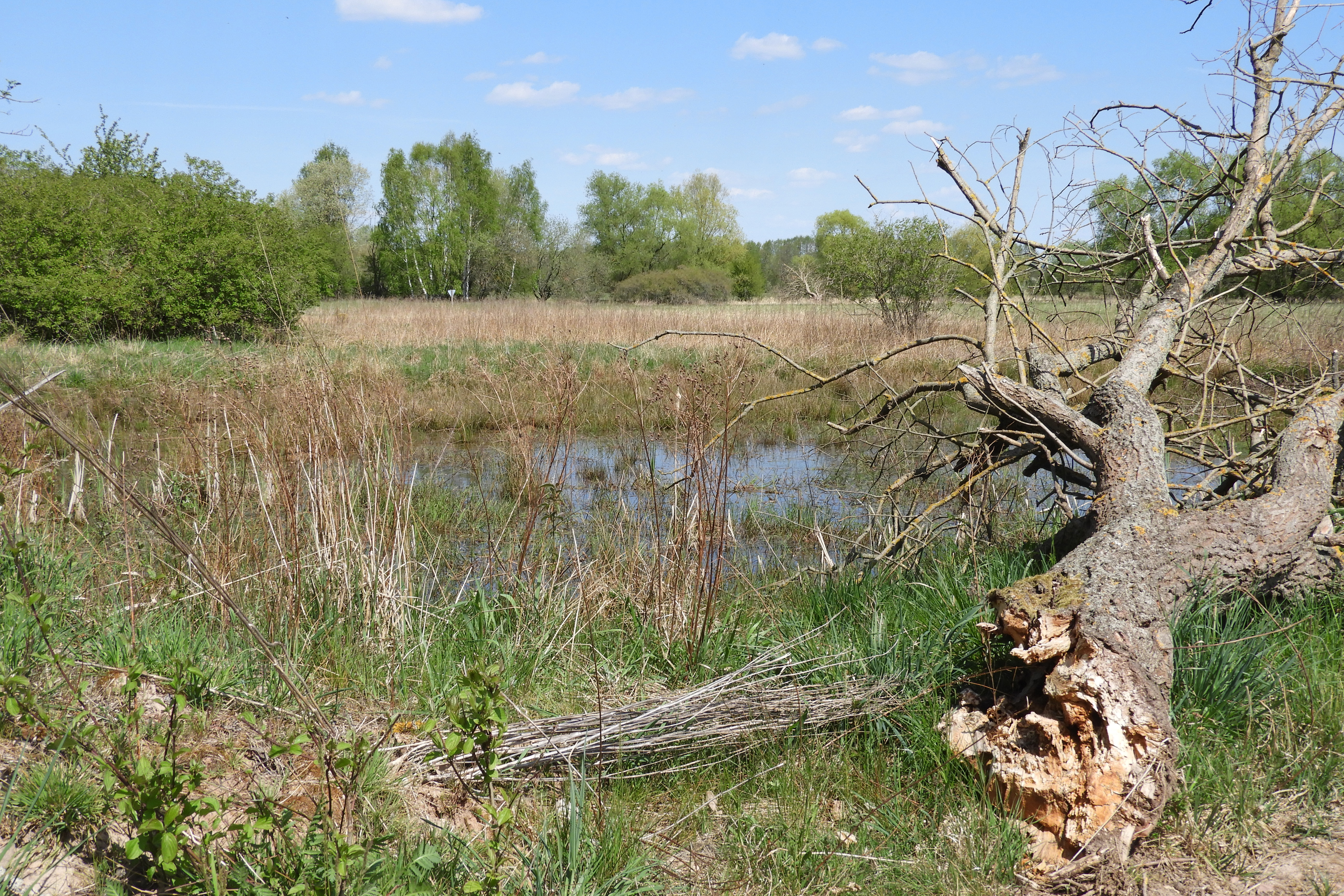 Die Obersuhler Aue im nordosthessischen Landkreis Hersfeld-Rotenburg ist ein großflächiger offener Grünlandbereich. Das durch traditionelle Beweidung und Mahd entstandene Gebiet, das mit drei Seiten an Thüringen grenzt, ist zum Lebensraum für viele schutzwürdige Pflanzen- und Tierarten geworden. Um die unterschiedlich feuchten Wiesen und Brachflächen zu bewahren und zu schützen, wurde die Aue im Jahr 1990 zum Naturschutzgebiet erklärt und später als ein Flora-Fauna-Habitat-Gebiet in dem europaweiten Netz von Schutzgebieten „Natura 2000“ verankert. Als eine von vier Teilflächen gehören die Wiesen auch zu dem Europäischen Vogelschutzgebiet „Rhäden von Obersuhl und Auen an der mittleren Werra“, das als wichtiges Brut- und Rastgebiet für bestandsgefährdete Vogelarten gilt.